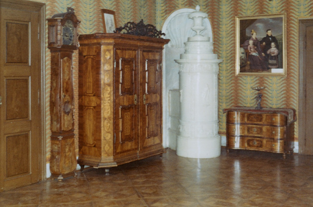 Schönes Zimmer im Neuen Herrenhaus Blumau, Teilansicht